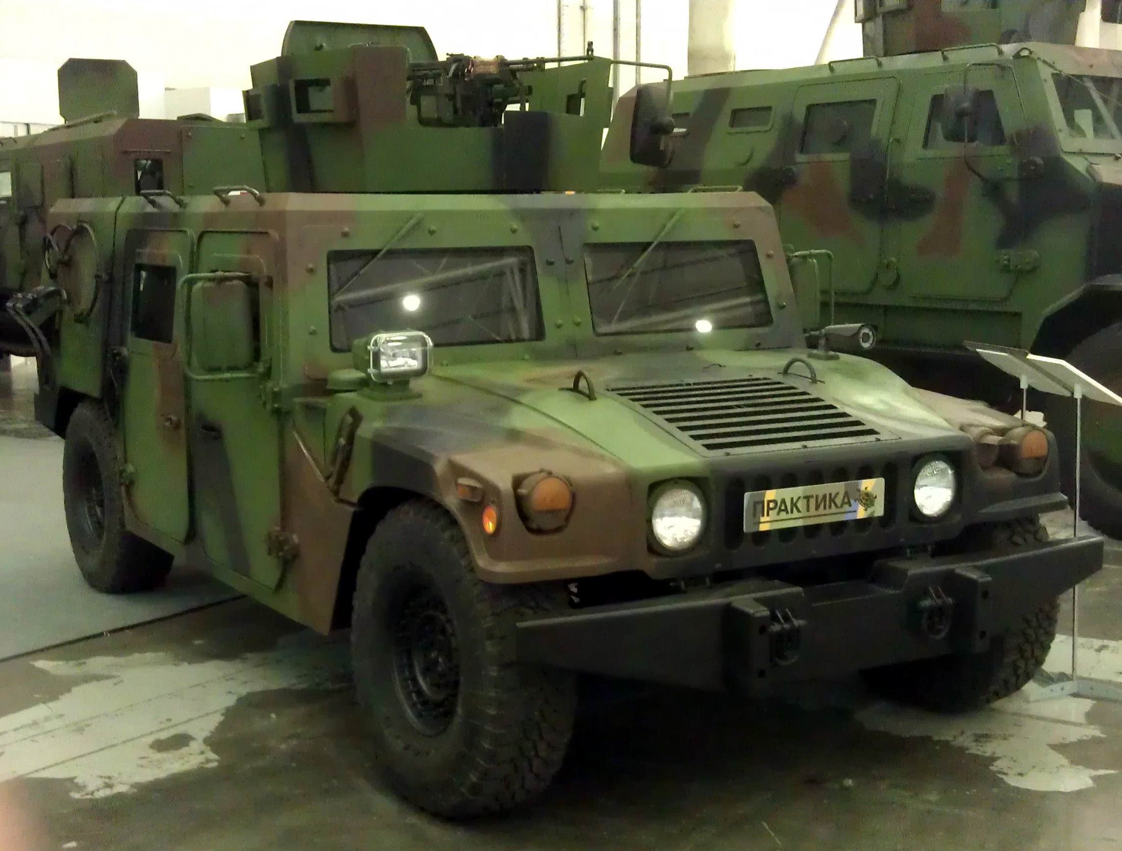 HMMWV M998, вариант модернизации НПО "Практика". Выставка "Зброя та безпека", Киев, сентябрь 2015 г.